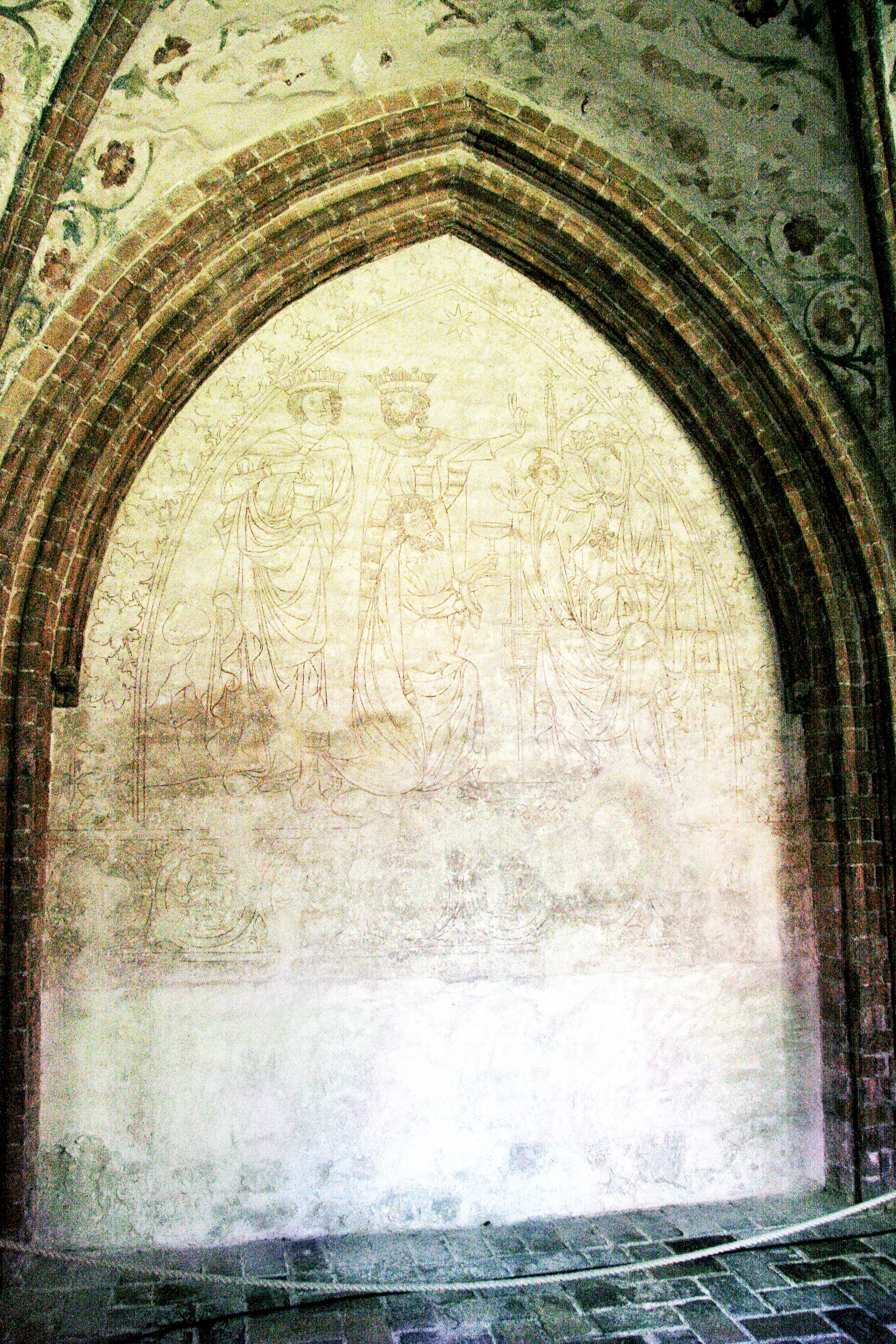 Mittelalterliche Wandszene "Die Anbetung der heiligen drei Könige" im Südflügel des Schwahls